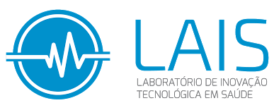 logo lais